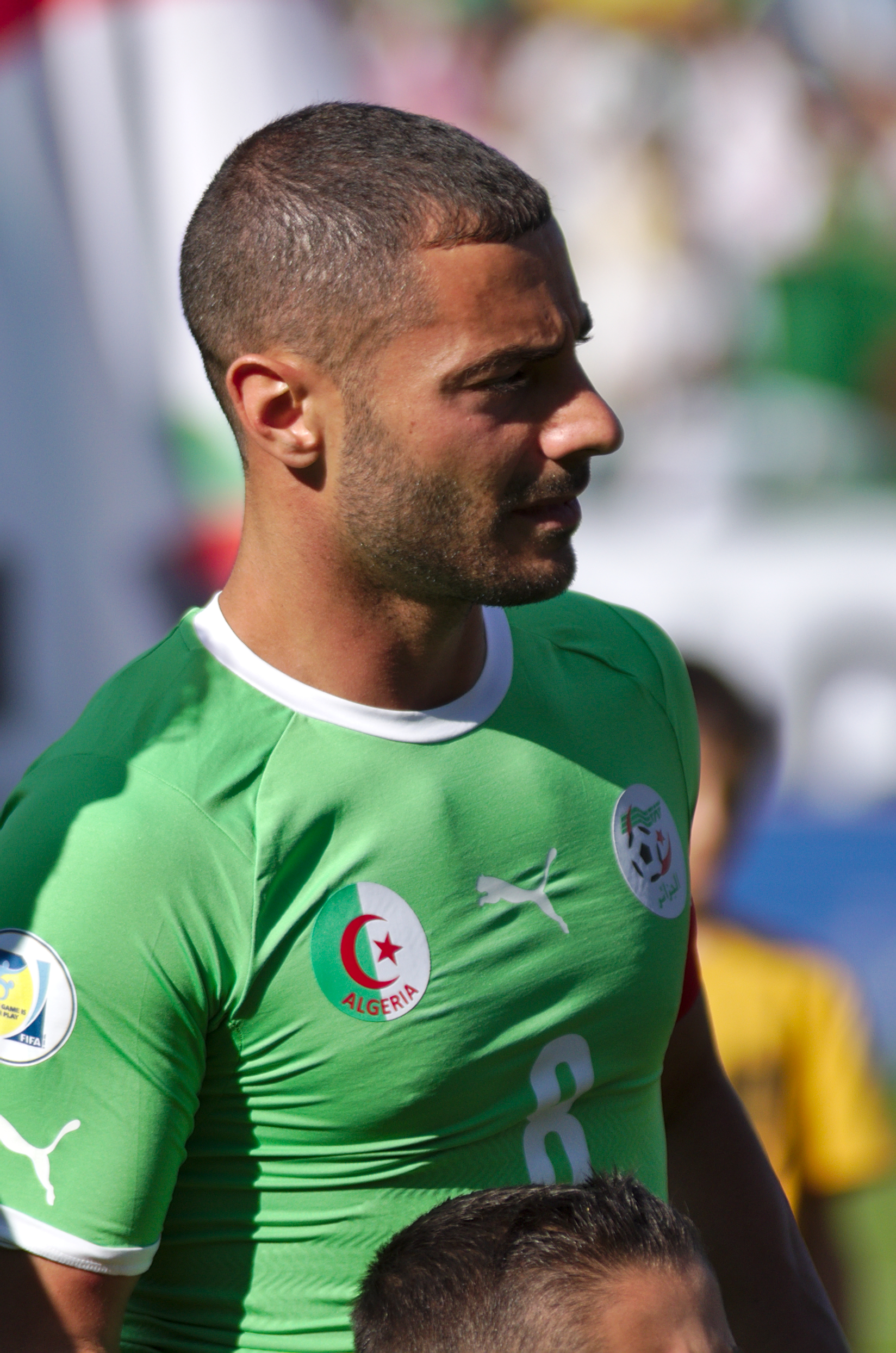 Algérie - Arménie - 20140531 - Mehdi Lacen